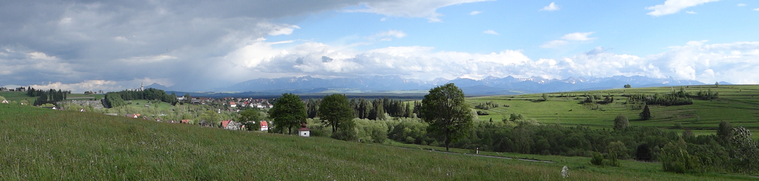 Jabłonka (województwo małopolskie)